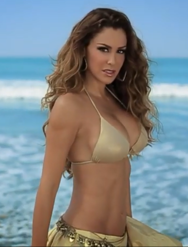 Ninel Conde en campaña de Cklass en 2013